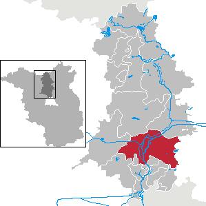 Oranienburg in Brandenburg (Country) - District Oberhavel